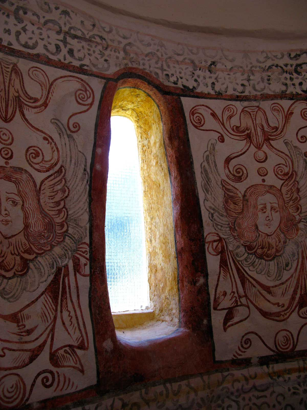 cerkvica v Lazah. igrejinha em Laze.